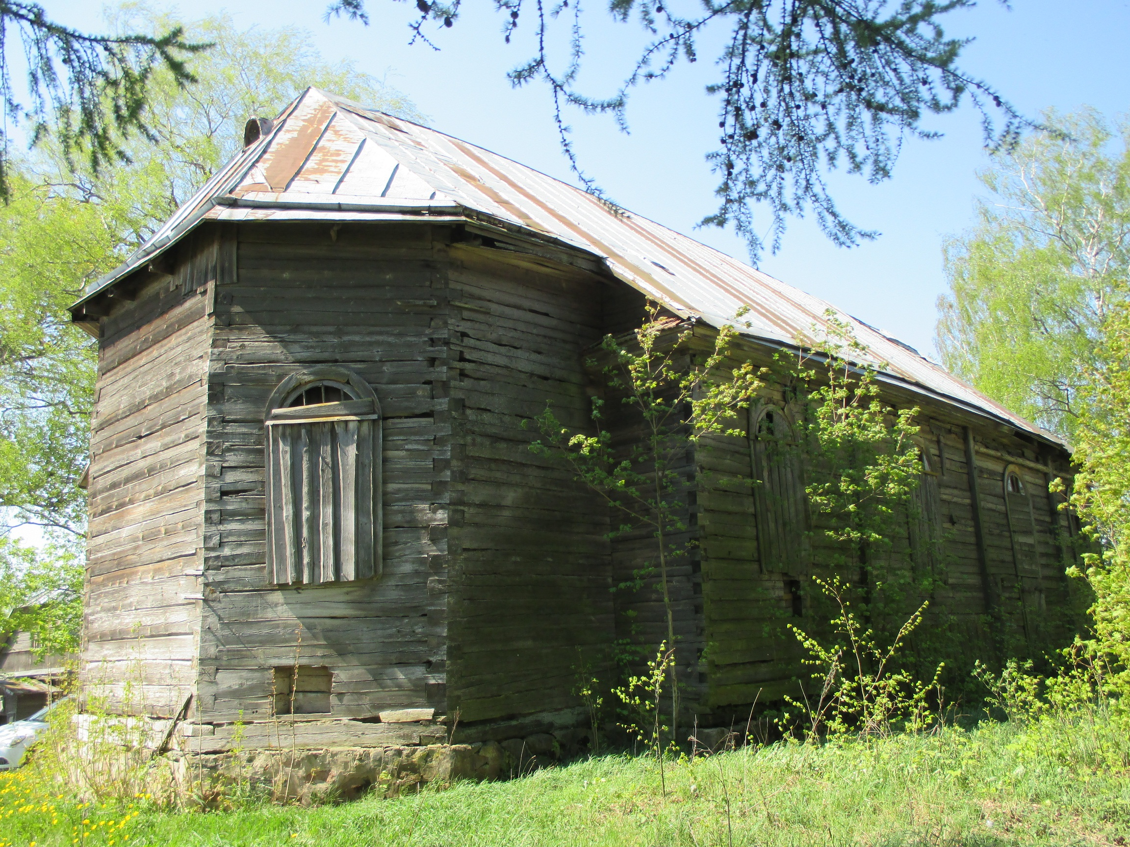 Касцёл Найсвяцейшага Сэрца Ісуса, вёска Лоск, Валожынскі раён, Беларусь